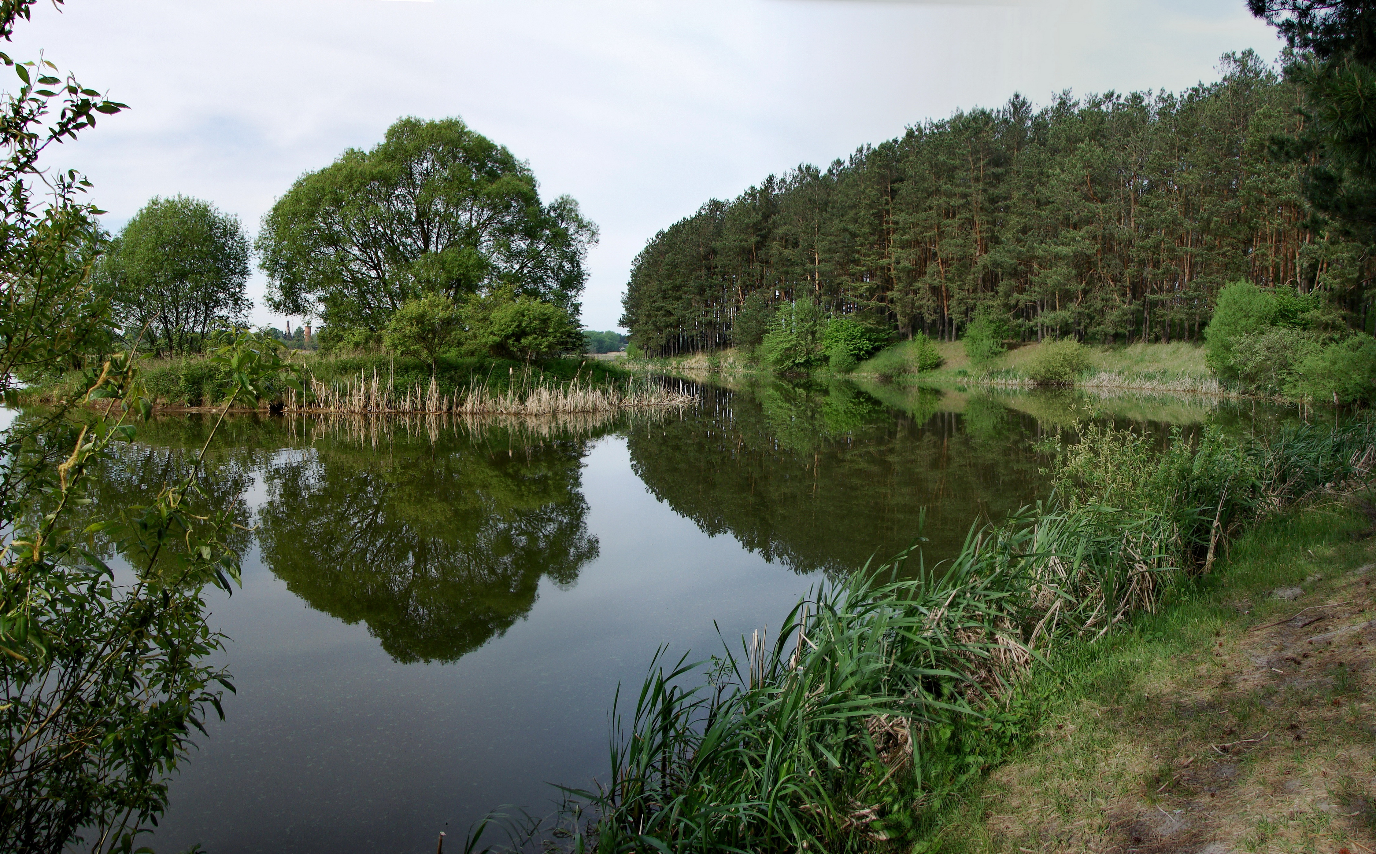 «Деснянсько-Старогутський», Середино-Будський р-н: Зноб-Трубчевська, Старогутська, Стягайлівська, Очкинська, Нововасилівська, Кривоносівська, Кренидівська с/р; ДП «С.-Будський агролісгосп»: кв. 1-10, 12-14, 18, 20, 21 (вид. 1-11, 17), 22, 23 (вид. 1-12, 19), 51, 52 (вид. 10-46), 53, 76-77, 78 (вид. 1-27), 80 (вид. 1-22), 81 (вид. 23), 29, 31 (вид. 1-13, 17-41)